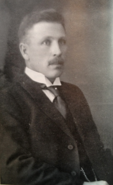 Johannes Holmberg, fotot taget vid när Johannes är ca. 25 år gammal.